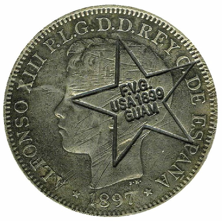 Moneda utilizada en el territorio de Guam hacia 1897